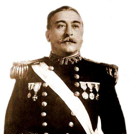 Fue en 1903, el 15 del mes de abril, cuando comenzó la huelga de los trabajadores encargados de las tareas de carga y de descarga de la Compañía Inglesa de Vapores (Pacific Stean Navegation Company), en Valparaíso. Los huelguistas reclamaban, inicialmente, una modificación en los horarios de trabajo que hasta ese momento era de seis de la mañana a seis de la tarde. Reclamaban también los estibadores de la Compañía Inglesa la necesidad de un alza en sus salarios, que era de alrededor de un 10%. El gerente de la Compañía Inglesa, J. W. Sharpe, se negó terminantemente a considerar la demanda de los estibadores y amenazó a los huelguistas con el envió de “nuevas cuadrillas de trabajadores que ya tenían contratados”.